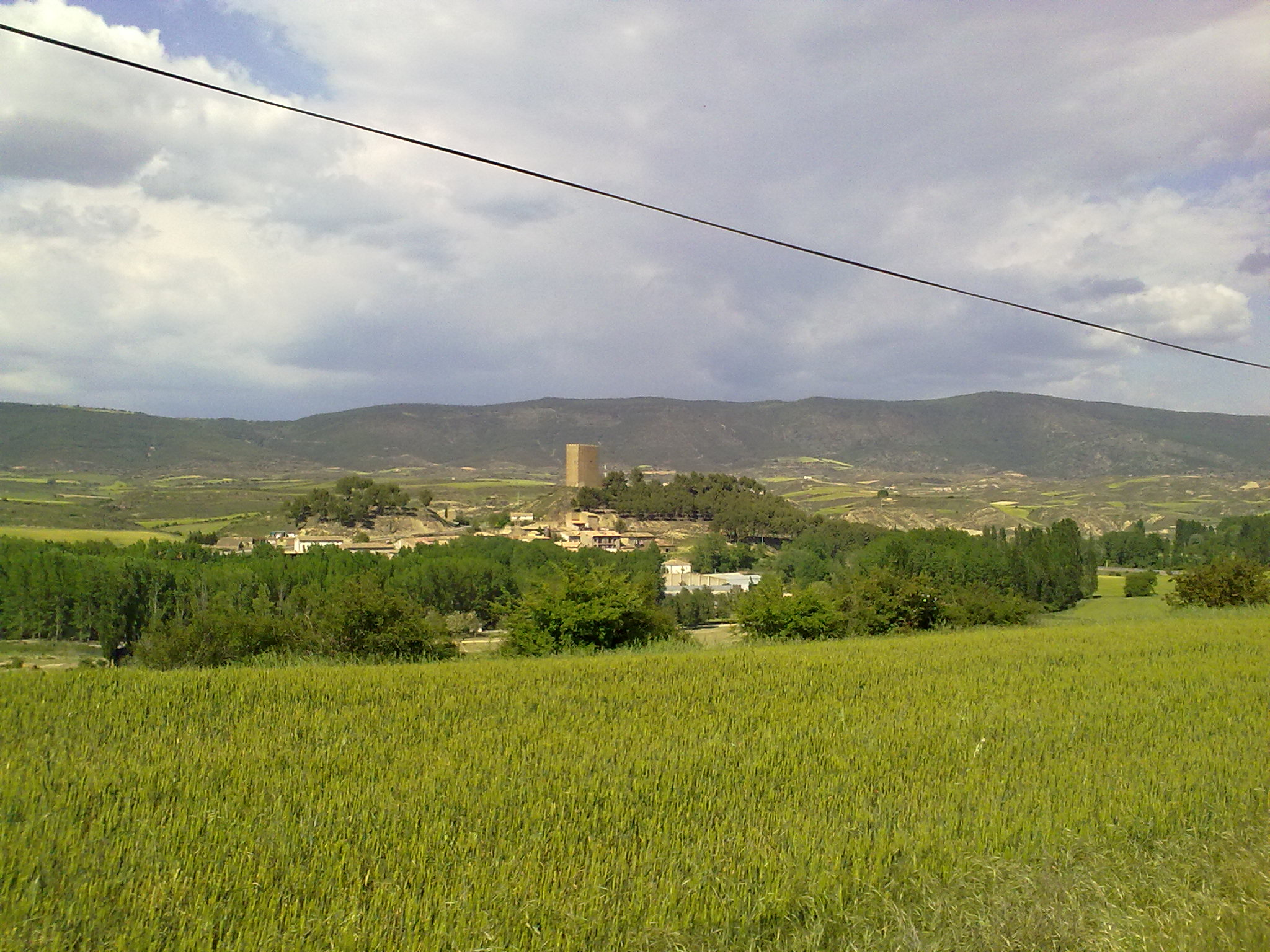 Navardún le 23 mai 2010. Espagne.